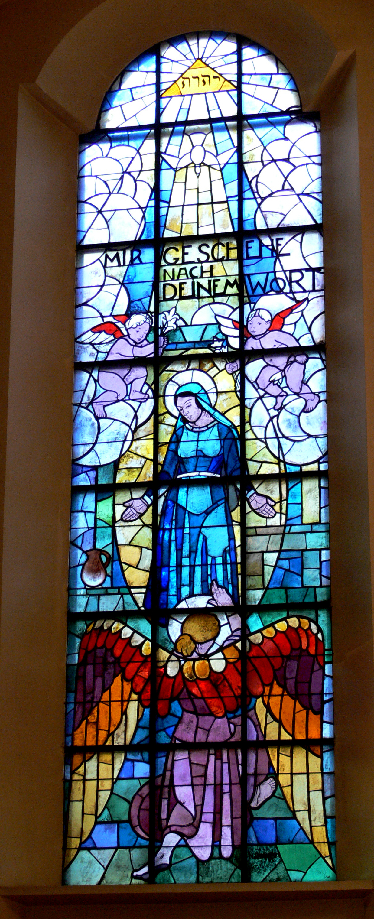 Pfarrkirche Mariahilf, Bregenz Glasfenster "Mariä Verkündigung", von Robin C. Andersen